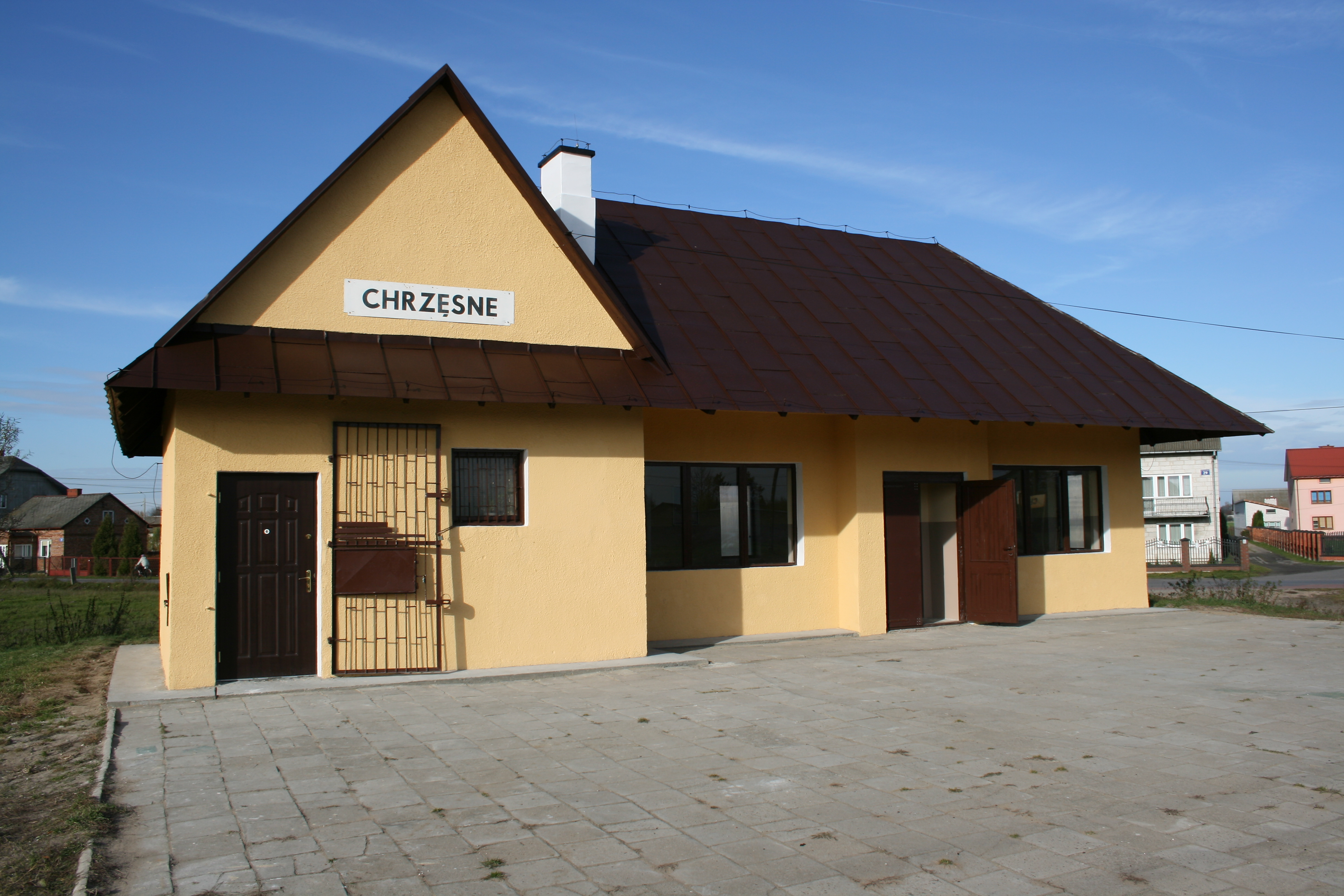 Widok na niedawno odremontowany budynek stacyjny przystanku Chrzęsne